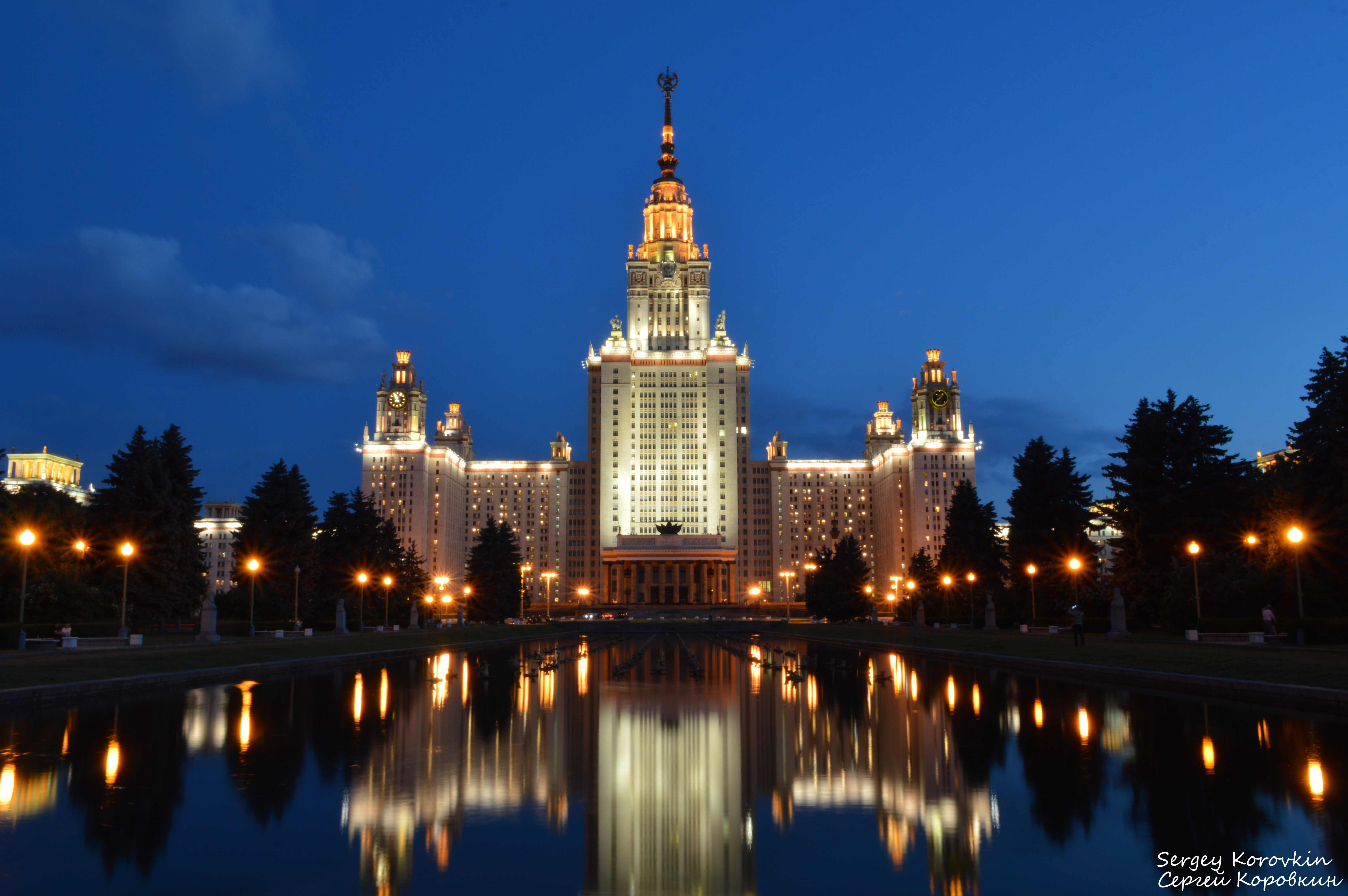 Московский государственный университет имени М.В.Ломоносова